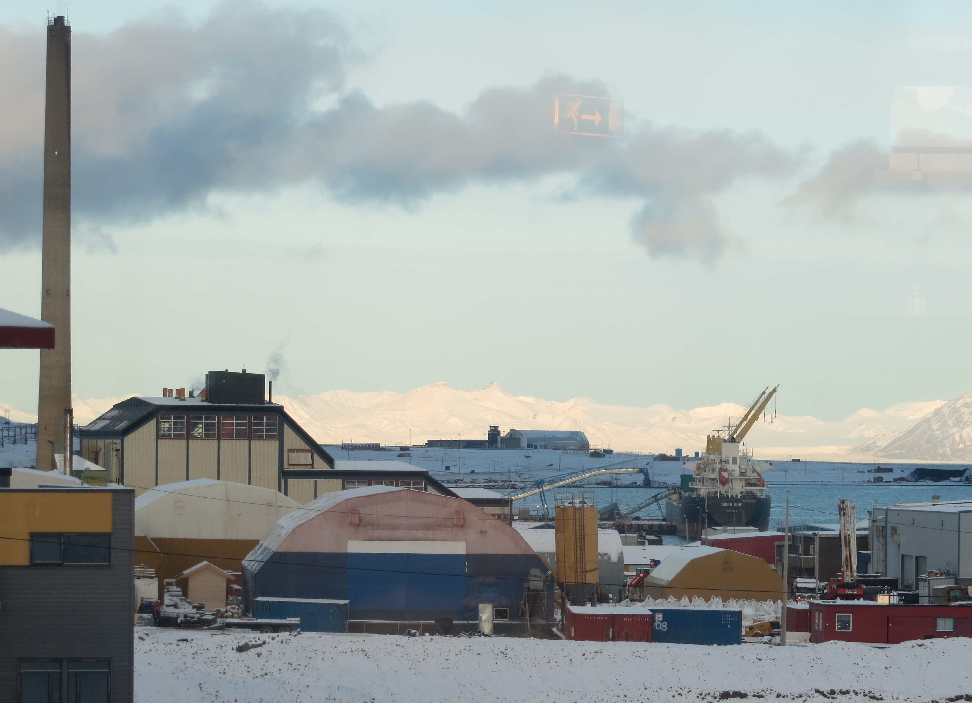 Sjöomraadet harbour area of Longyearbyen, in the Advent fjord. Spitsbergen, Norway.